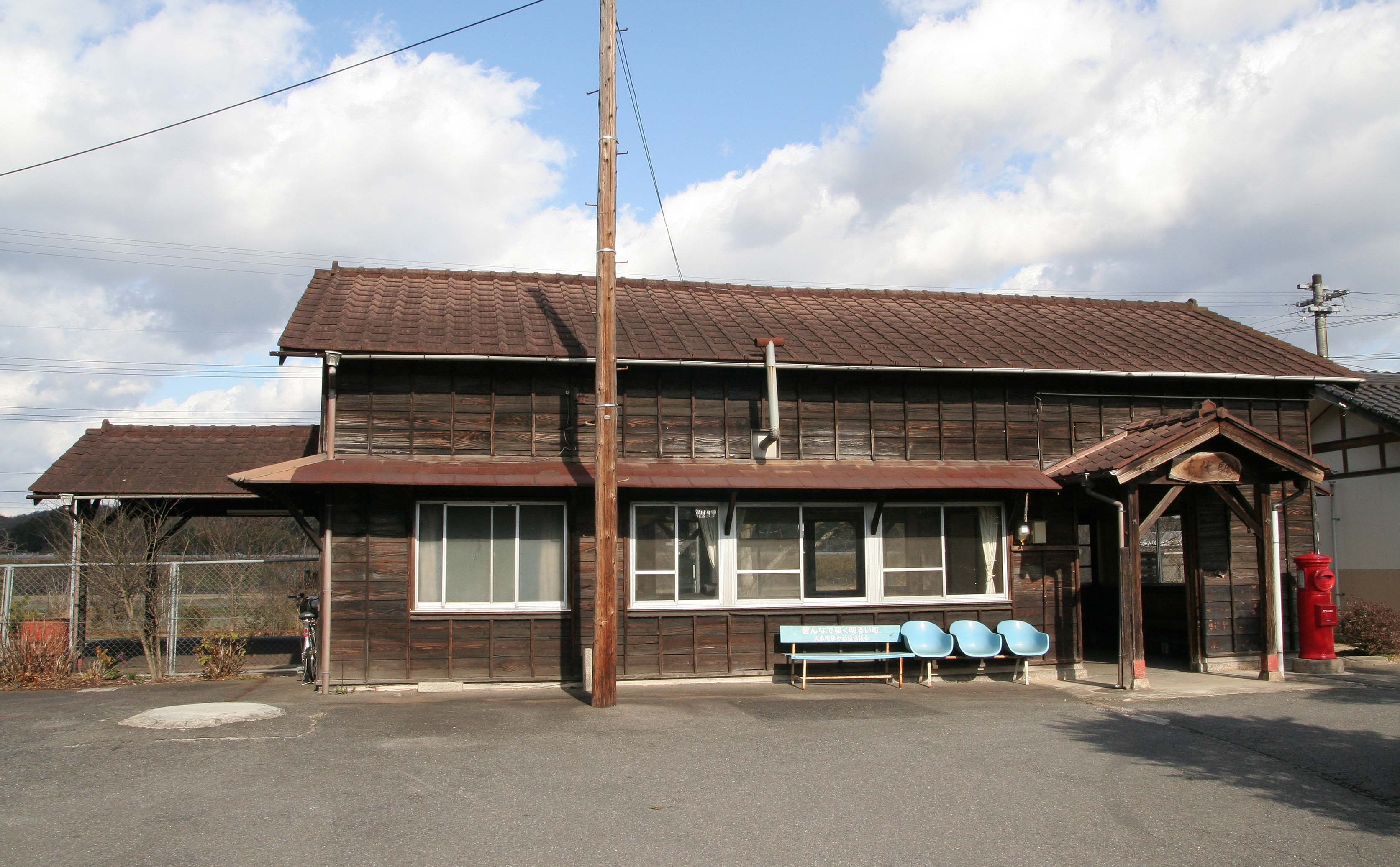 美作千代駅の駅舎